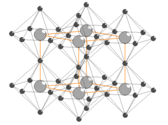 Kristallstruktur von Lithiumnitrid